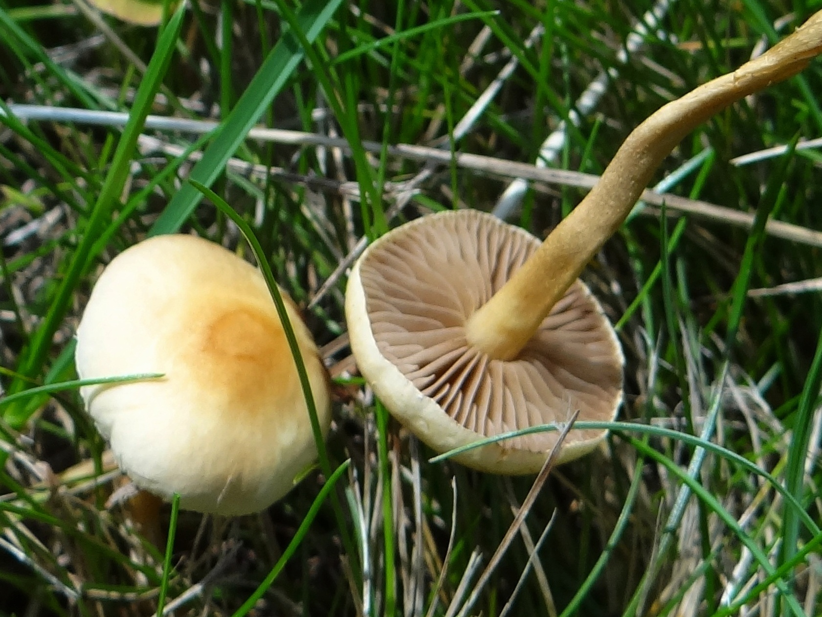 Agrocybe pediades